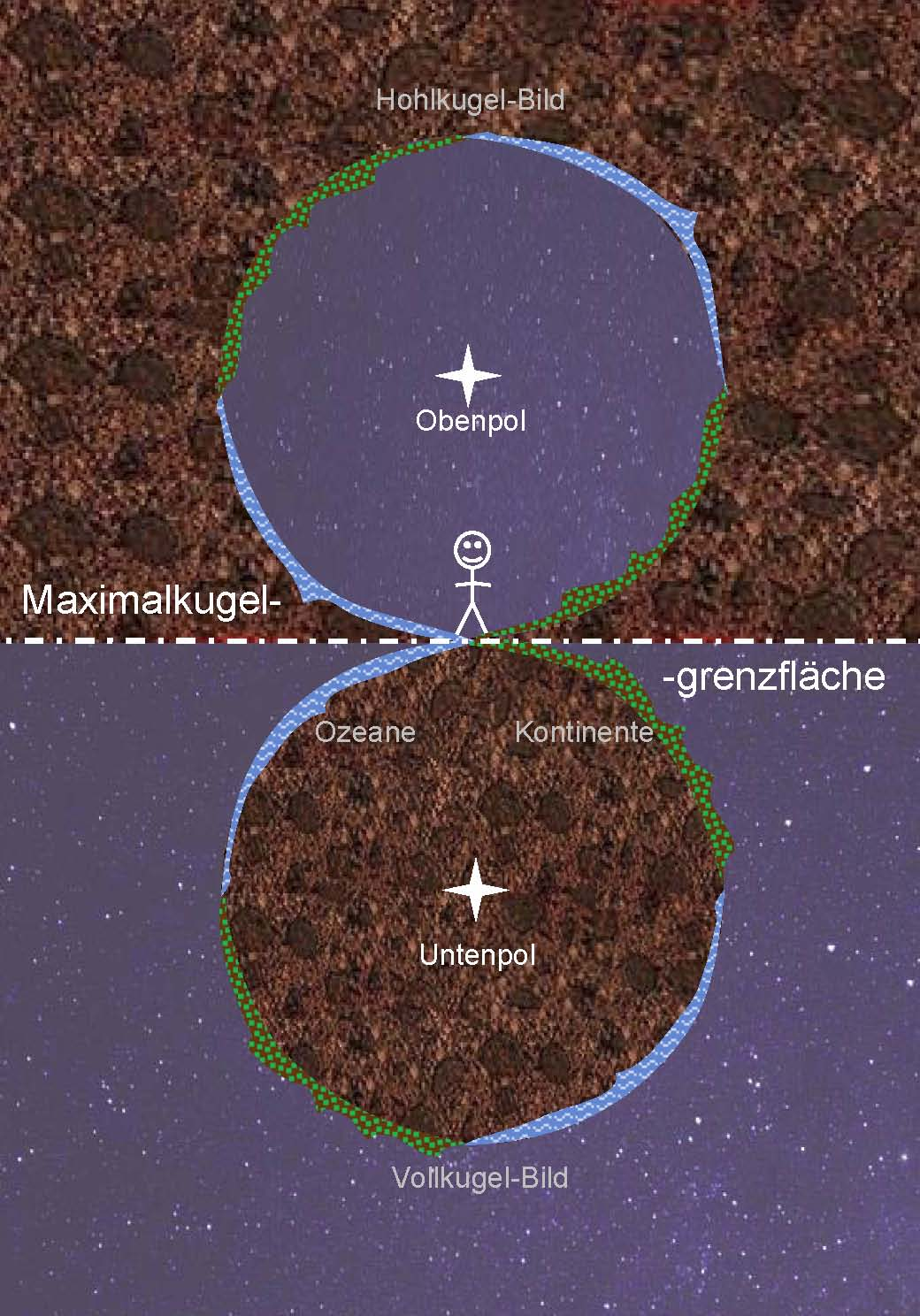 Polargeometrisches Weltbild nach Ernst Barthel